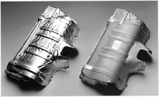 Teil nach dem Umformprozess: links im normalen Verfahren, glatt; rechts im NOPAL-Verfahren, nopalpiert